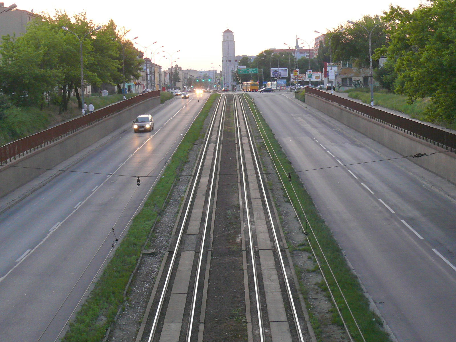 ul. Rzgowska w Łodzi